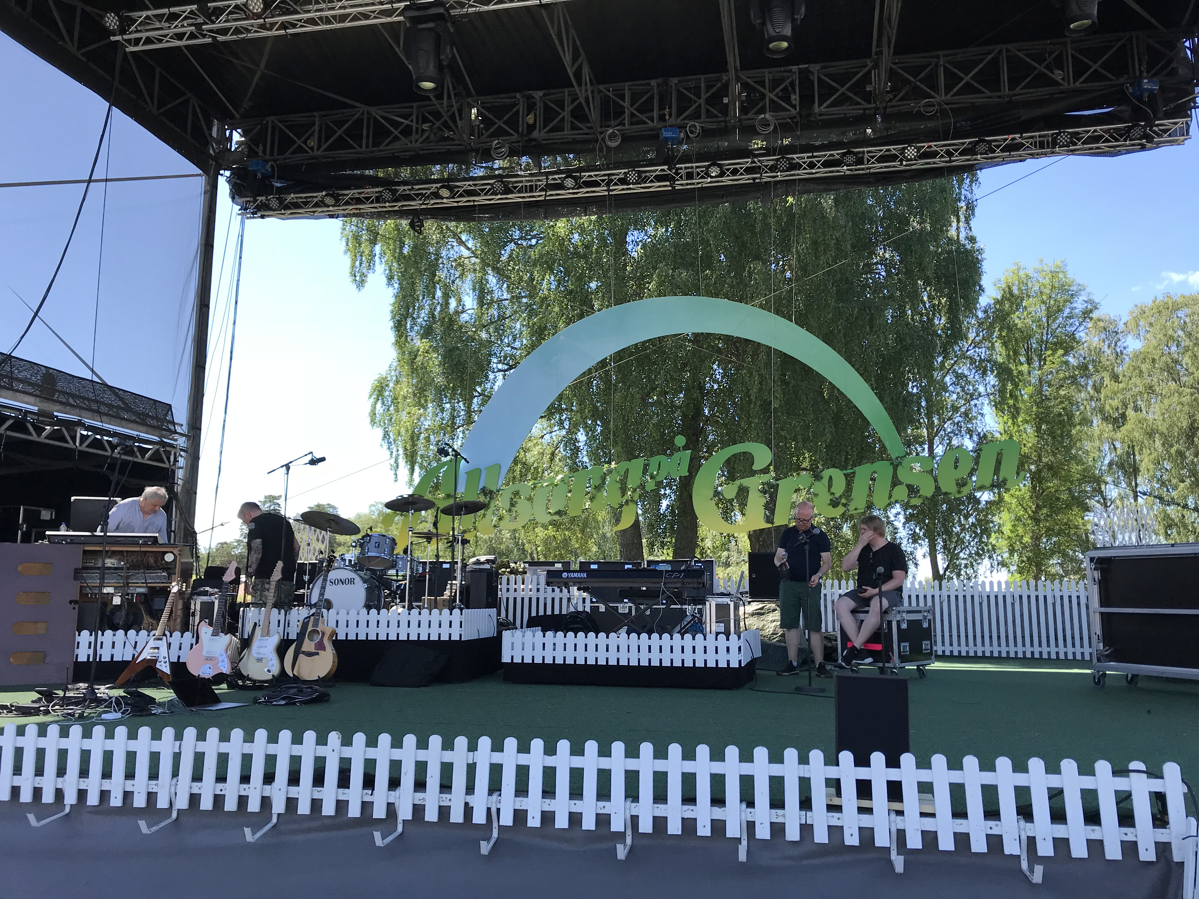 Förberedelser inför Allsång på gränsen vid Fredrikstens fästning.